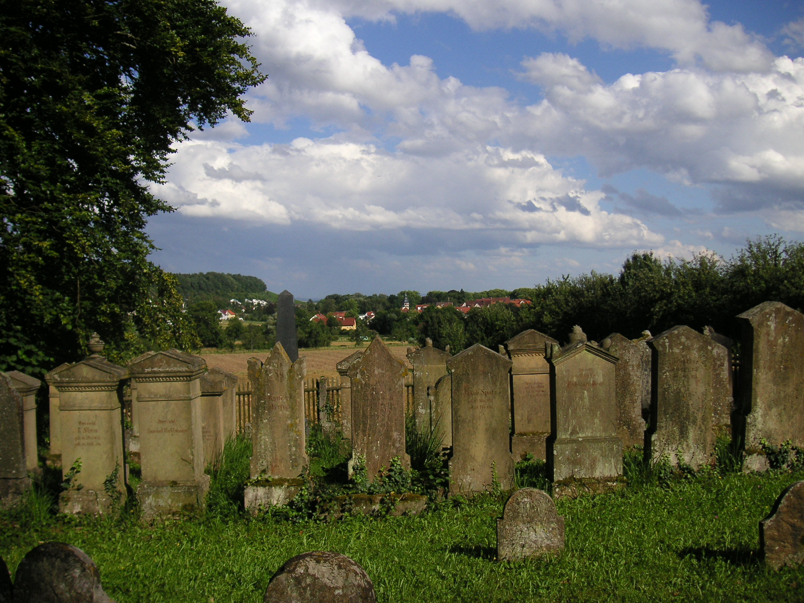 Zweiter Jüdischer Friedhof in Freudental Kreis Ludwigsburg